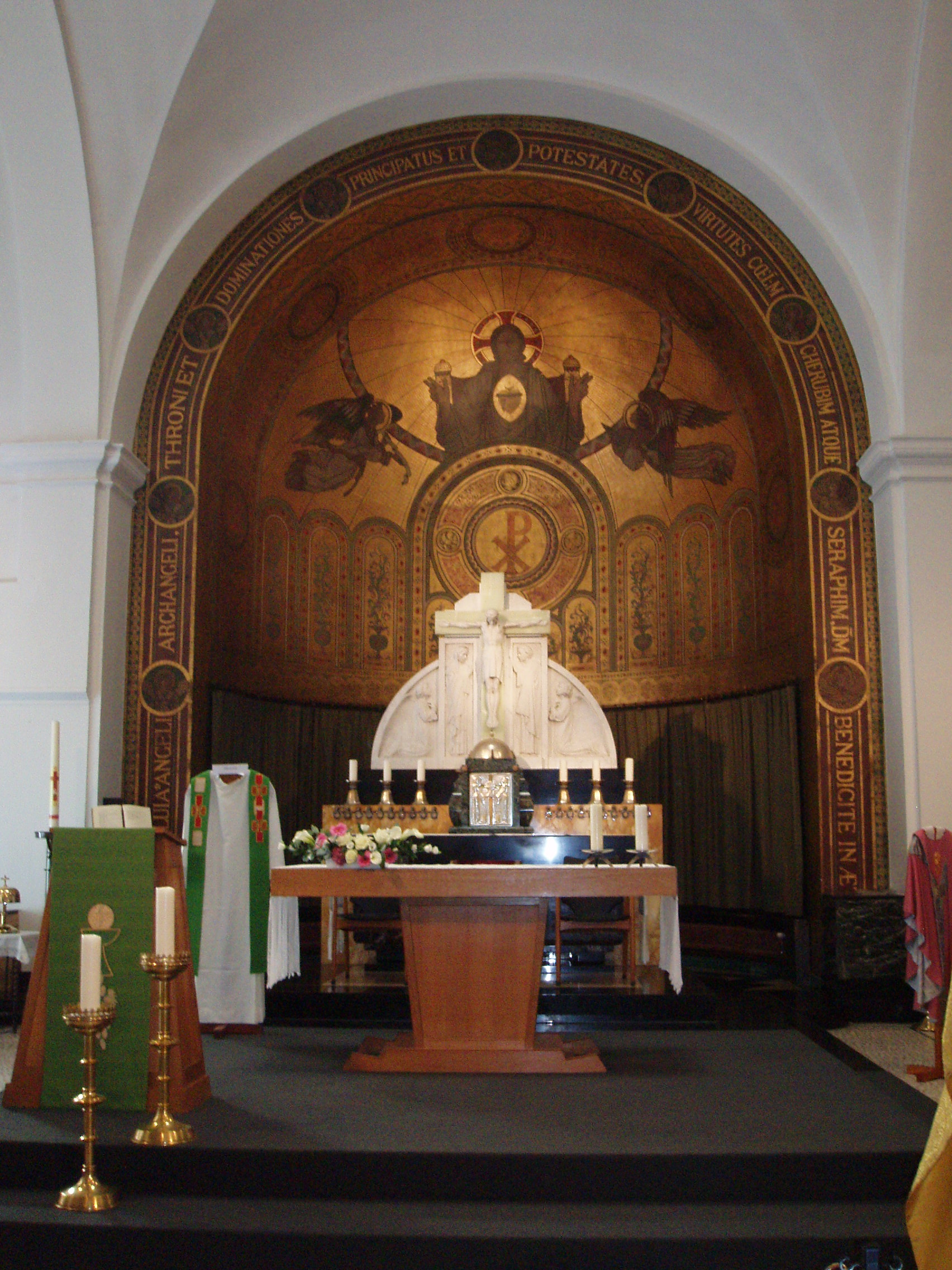 Kapel klooster Sint-Norbertushuis